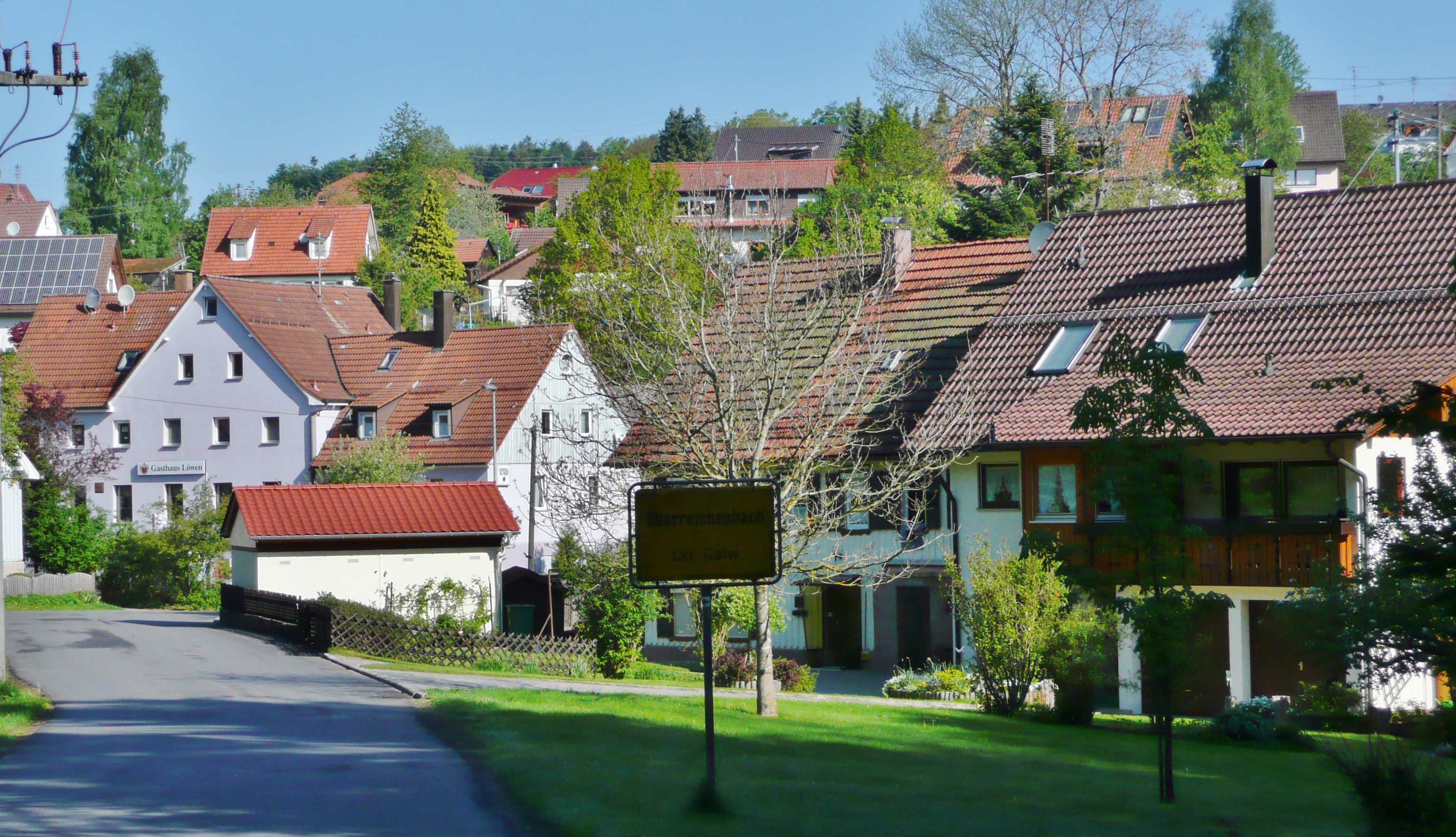 u. a. Gasthaus Löwen, Oberreichenbach